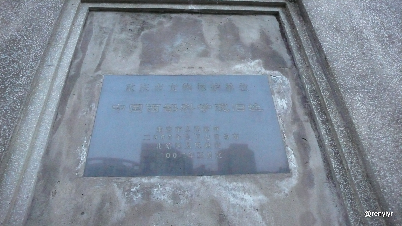 重慶市文物保護單位